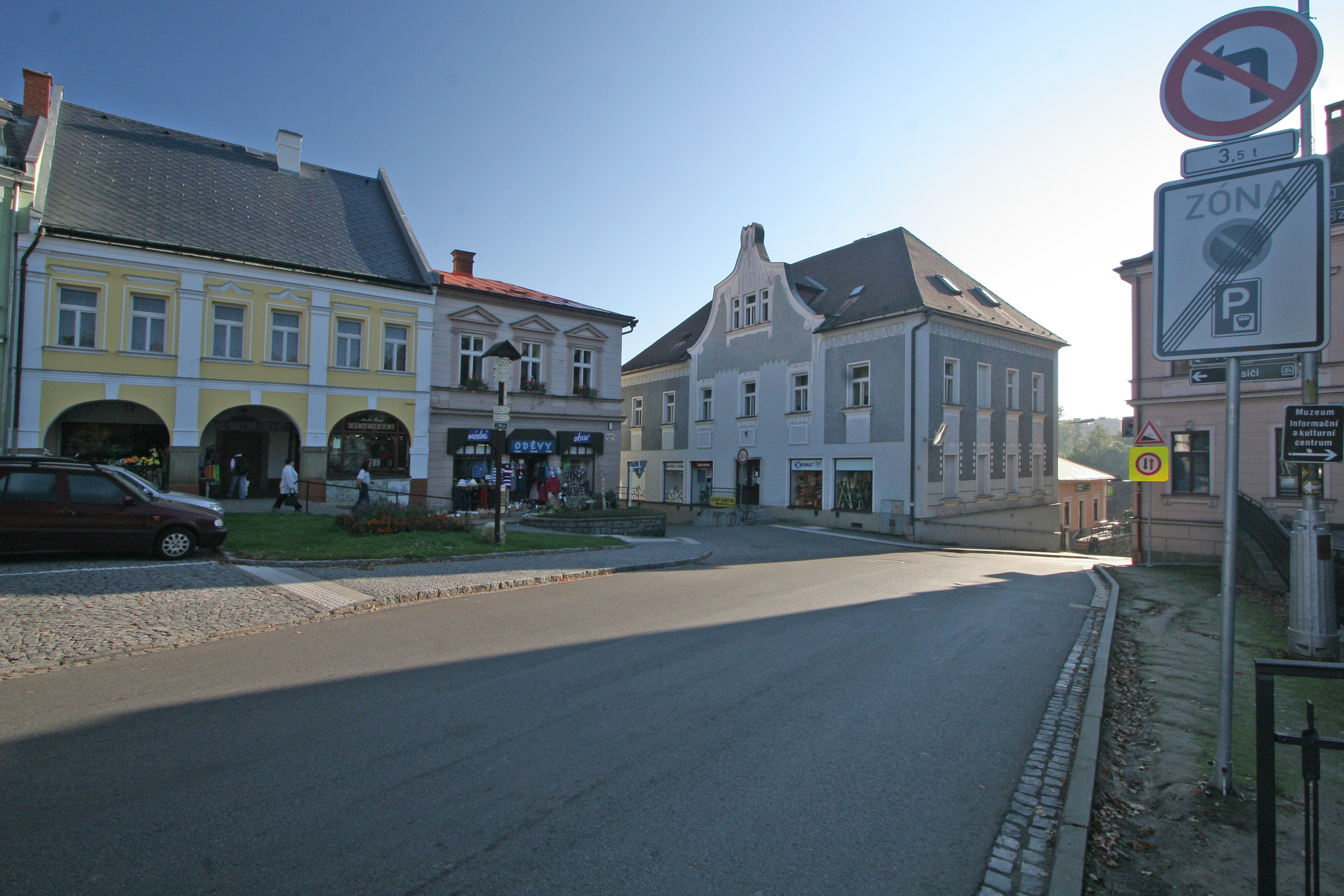 Městský domy (Letohrad), Václavské náměstí 60, 61 a 74, Letohrad